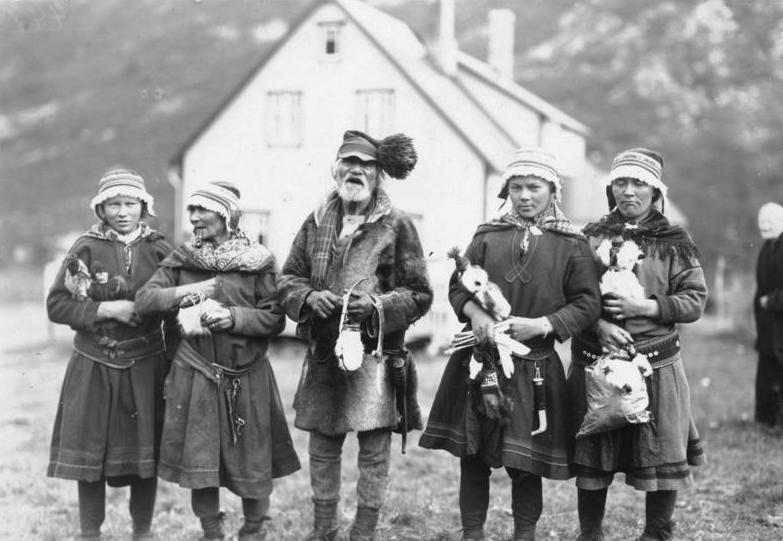 Polarfahrt mit dem Dampfer "München".- Lappen bieten selbstgefertigte Puppen aus Renntierfellen an 17. Juli - 12. August 1925